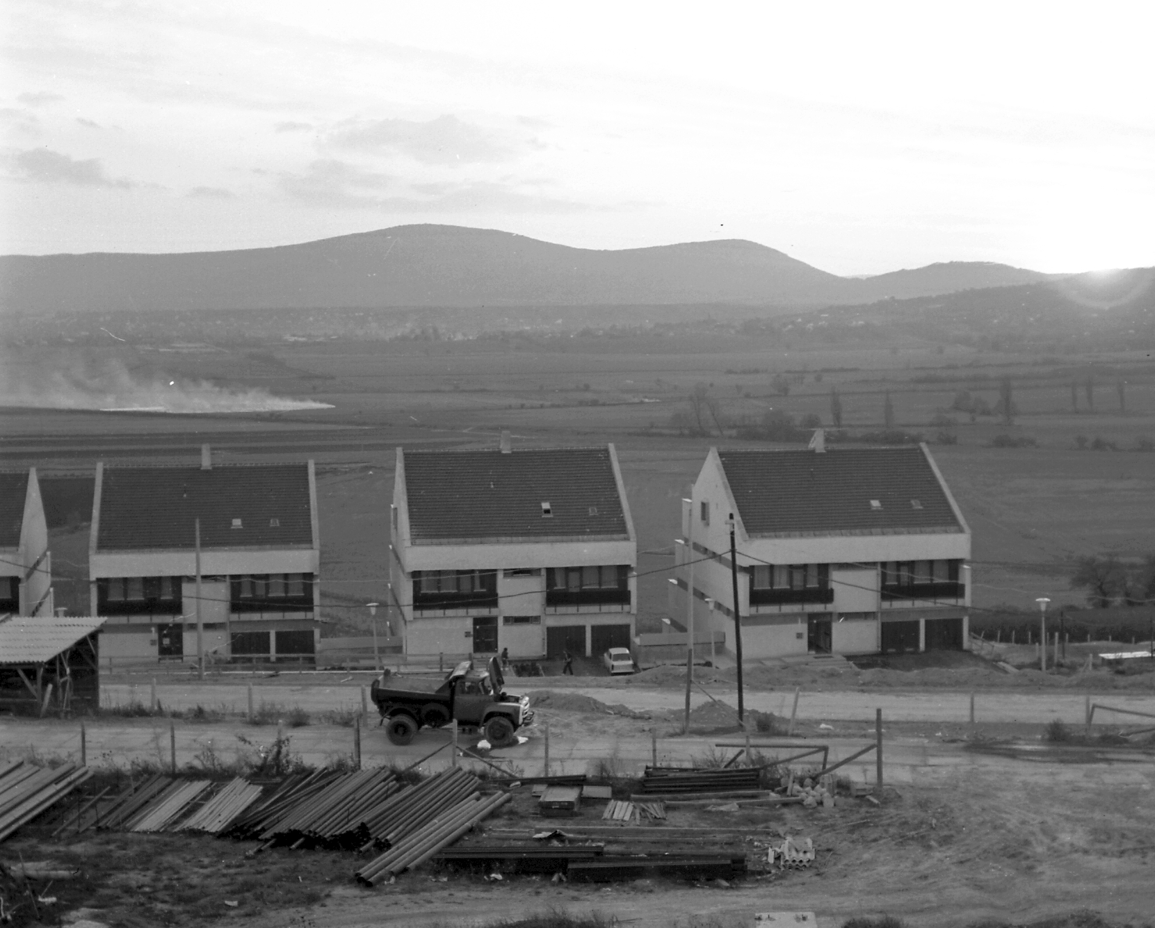 Radnóti Miklós sétány a Püspökmajor lakótelep felől. Location: Hungary, Szentendre Tags: ZIL-brand, Trabant-brand, Soviet brand, Gerrman brand, commercial vehicle, automobile, tipper Title: Radnóti Miklós sétány a Püspökmajor lakótelep felől.